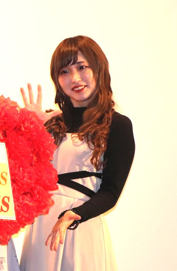 上野オークラ劇場 若月まりあ